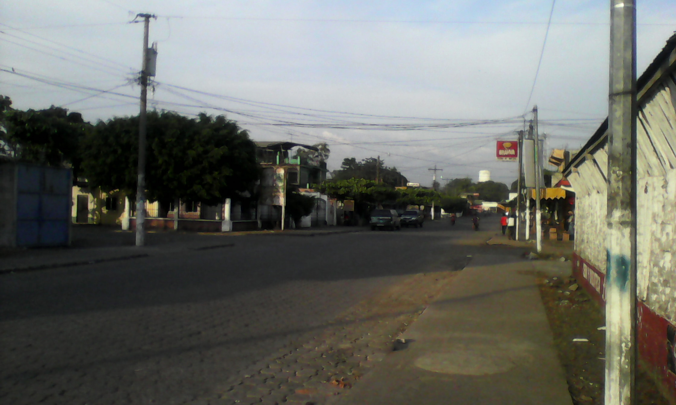 Calle principal en la zona 2 del municipio de Tiquisate, departamento de Escuintla, Guatemala.